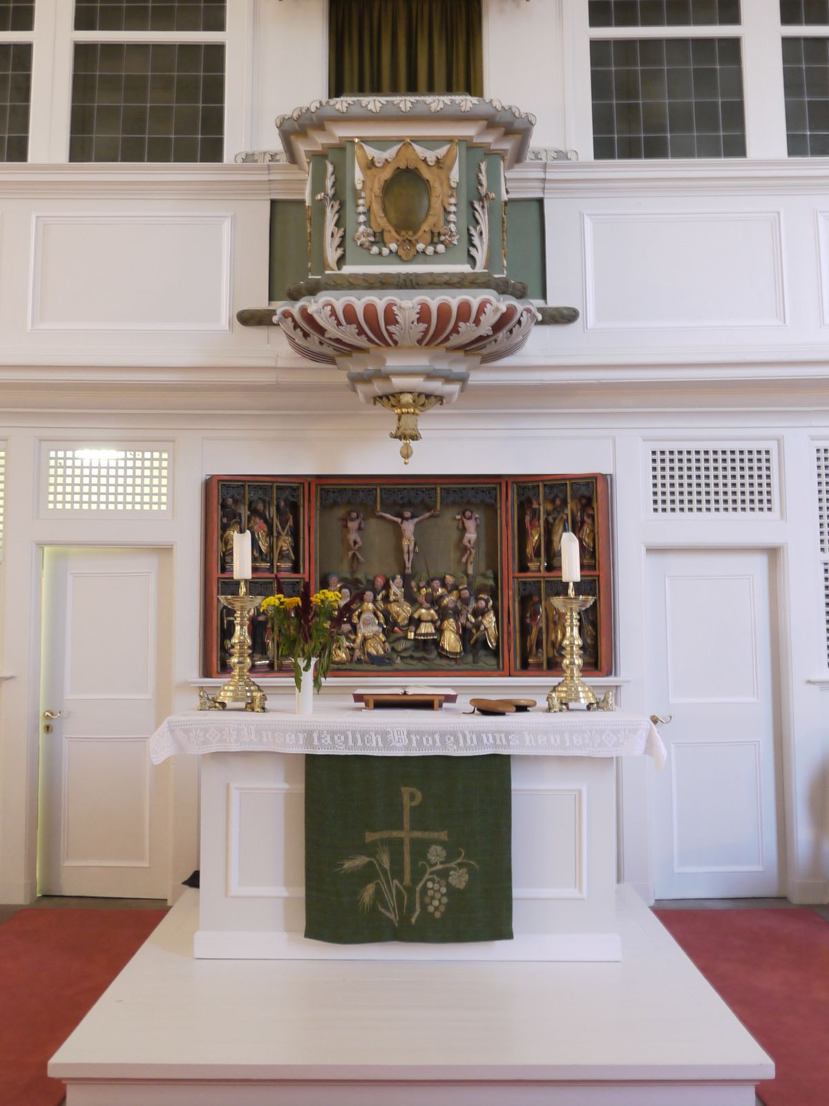 Schlosskirche (ev.) in Salzgitter-Salder - Altar und Kanzel